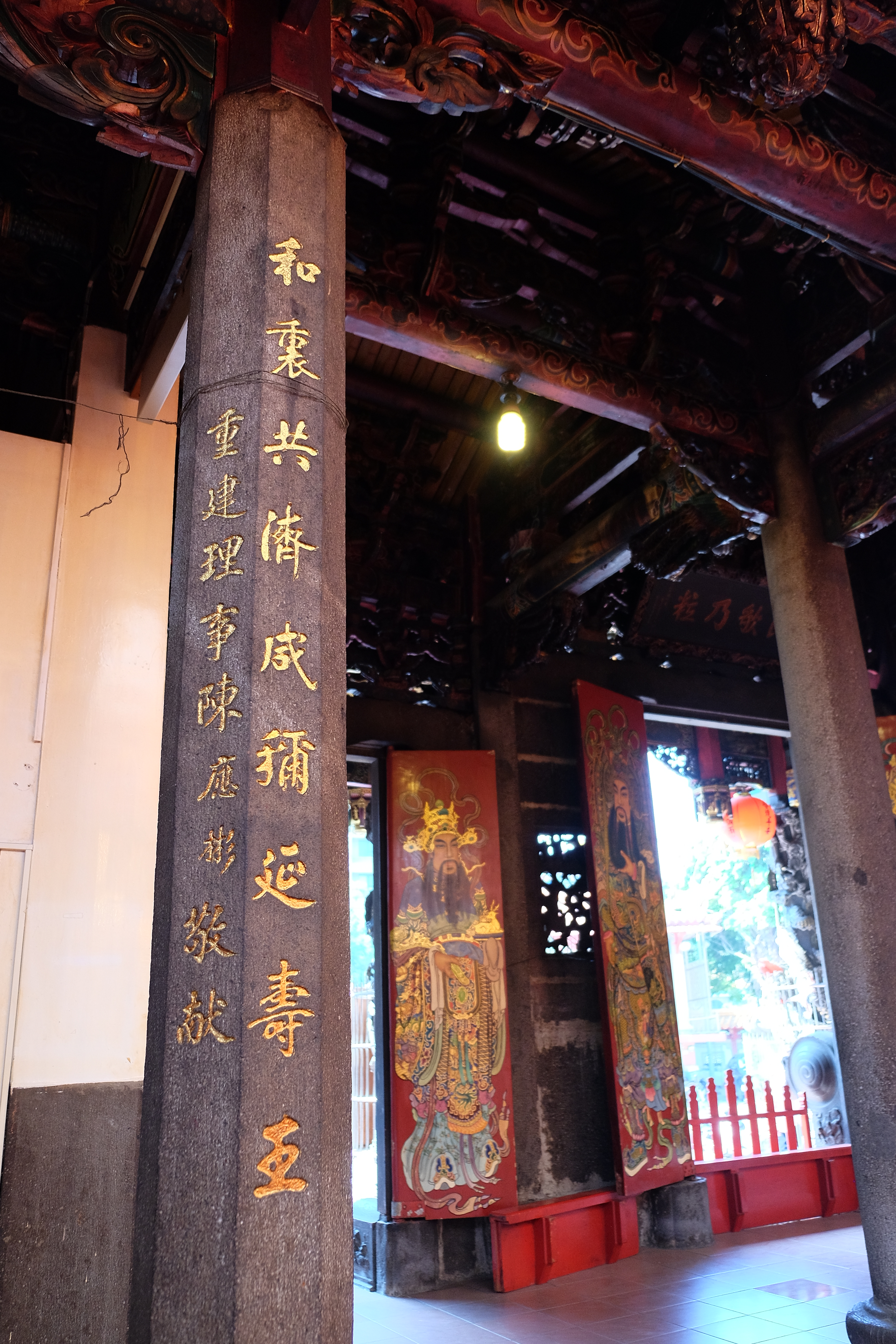 ZhongHe FuHe Temple 2018 中和福和宮陳應彬敬獻